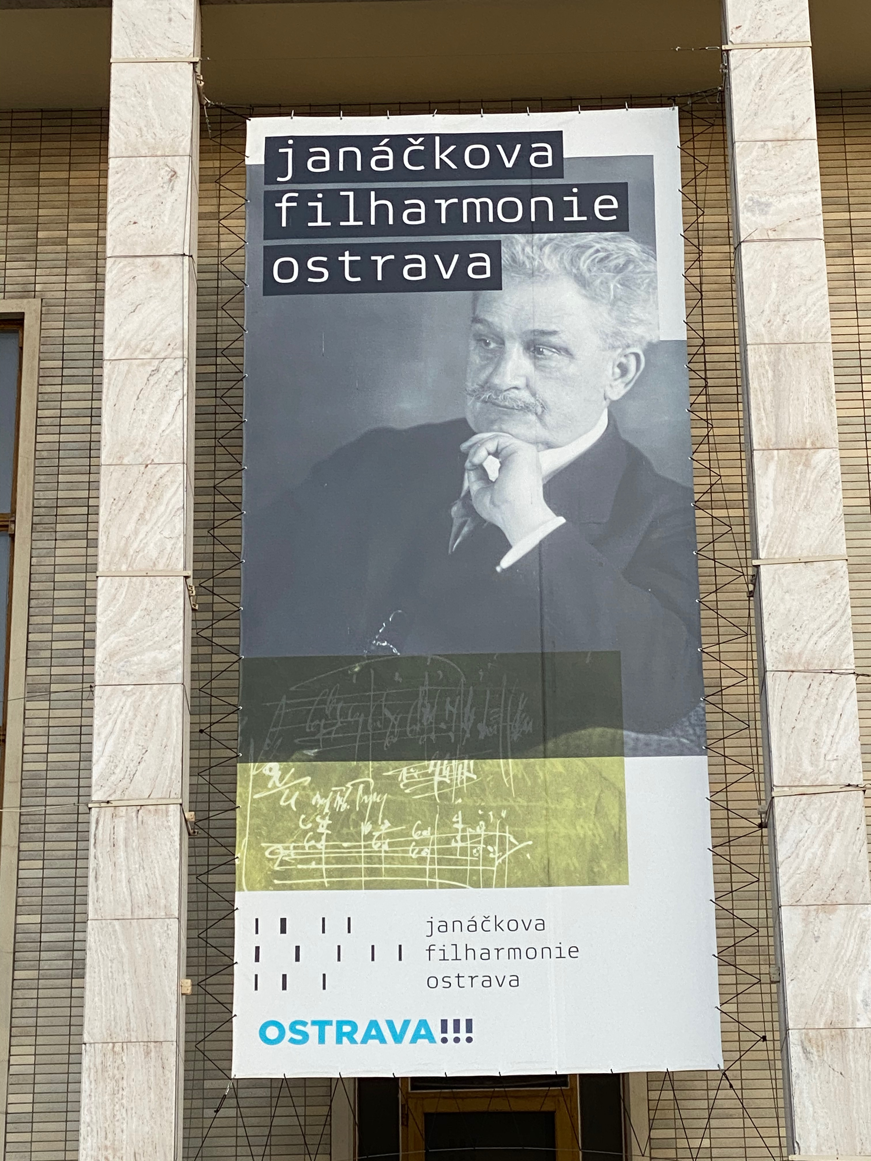 Orquestra Filharmònica Janáček - Imatge Janáček